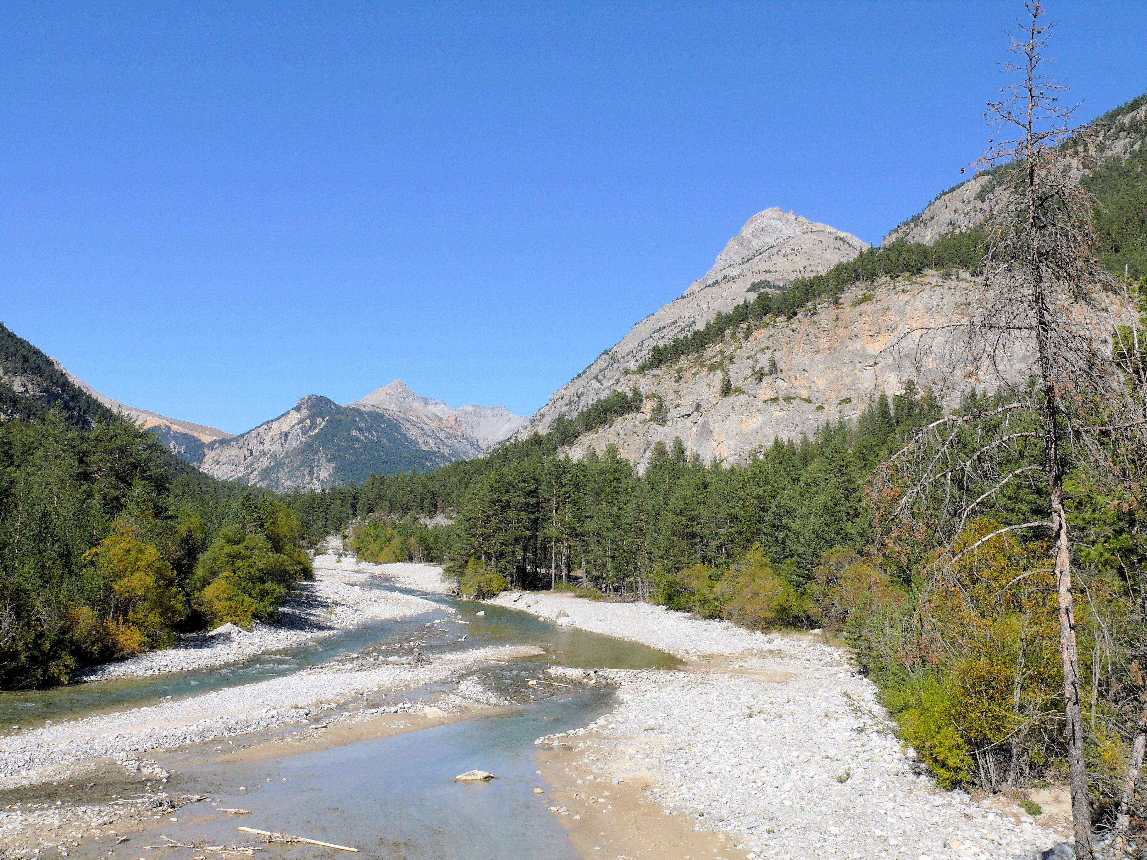 Vallée de la Clarée - La Clarée